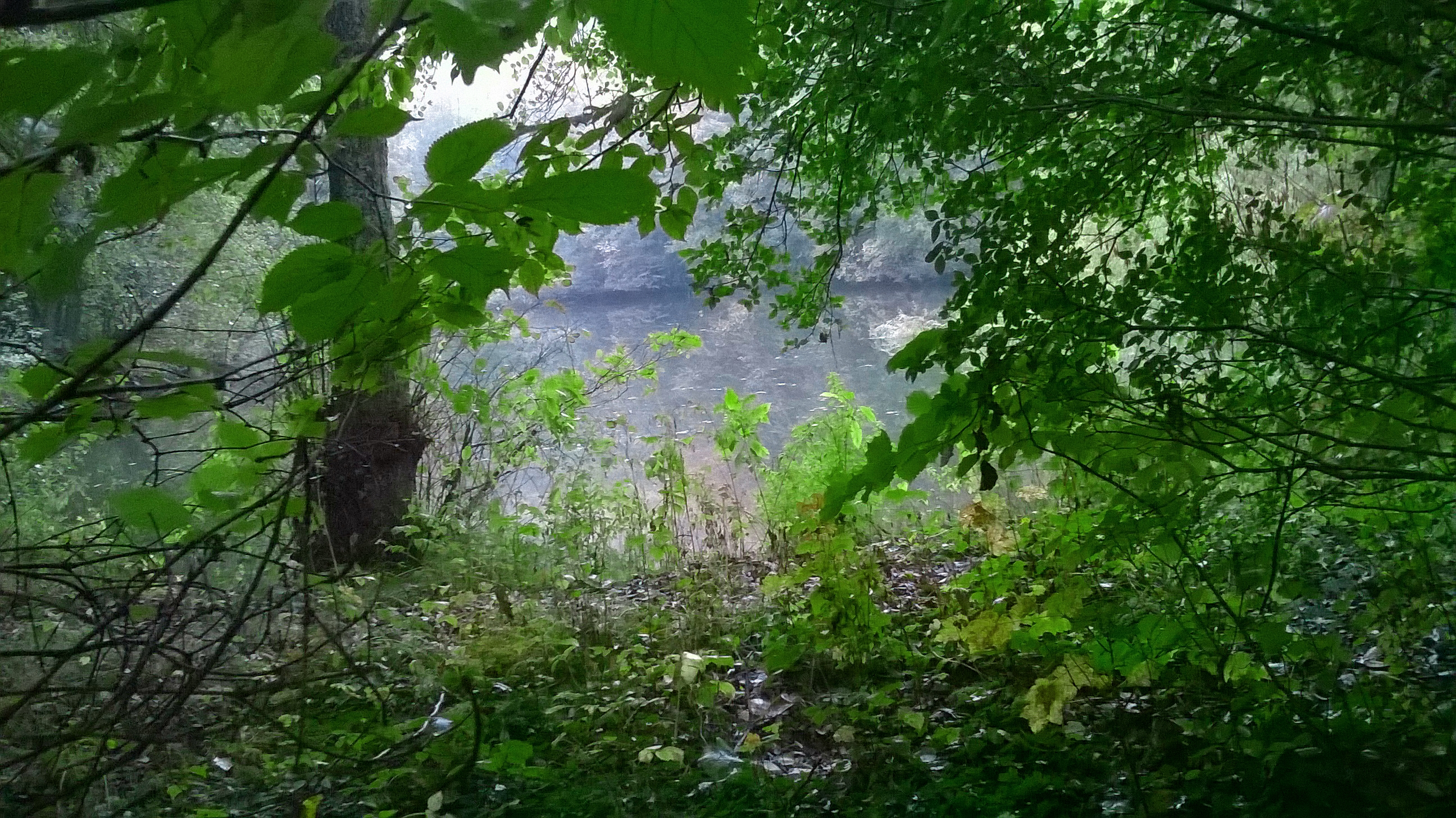 Einer der beiden Stauseen in Großbernsau (Overath) mit der Bezeichnung Bergweiher.